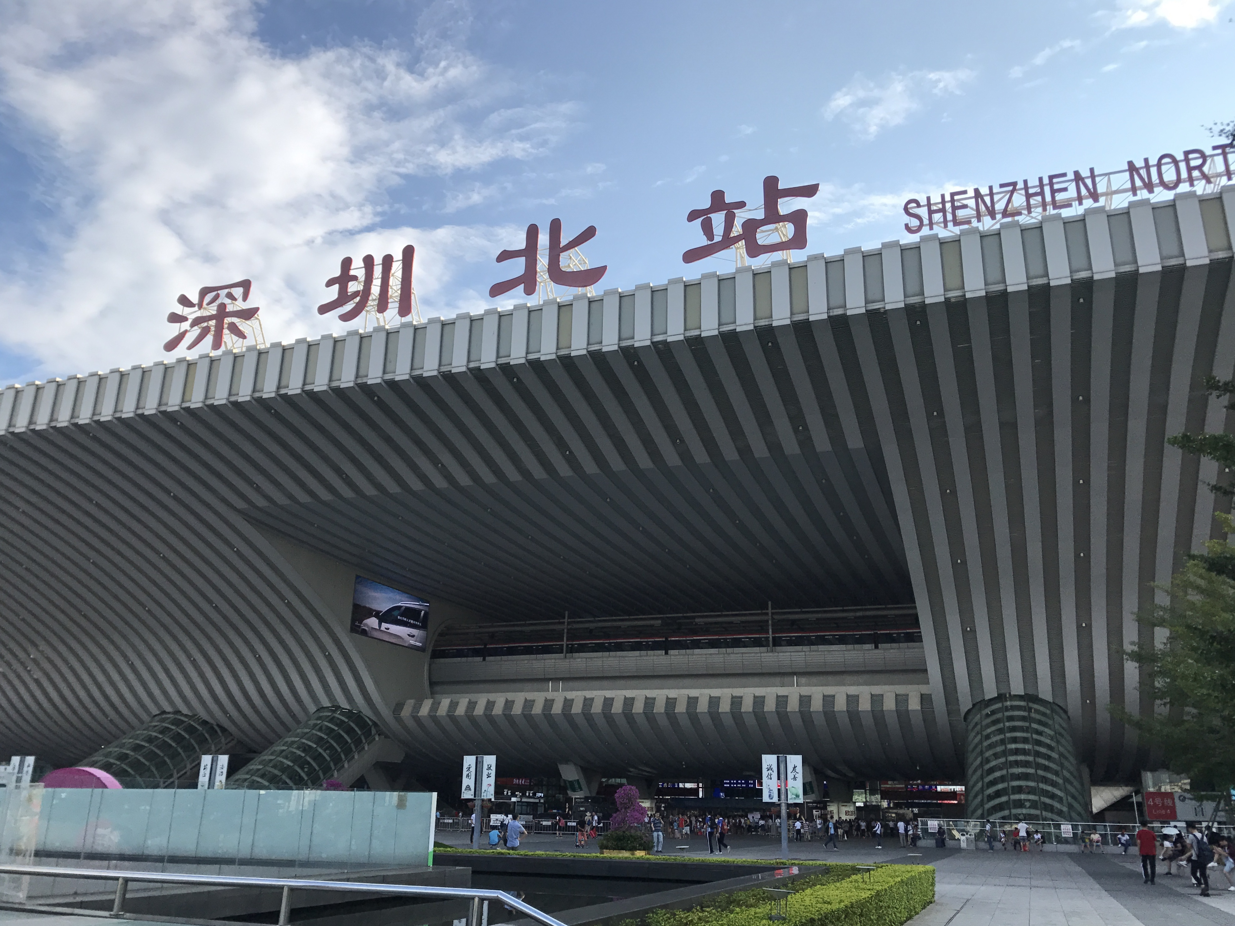 深圳北駅駅舎